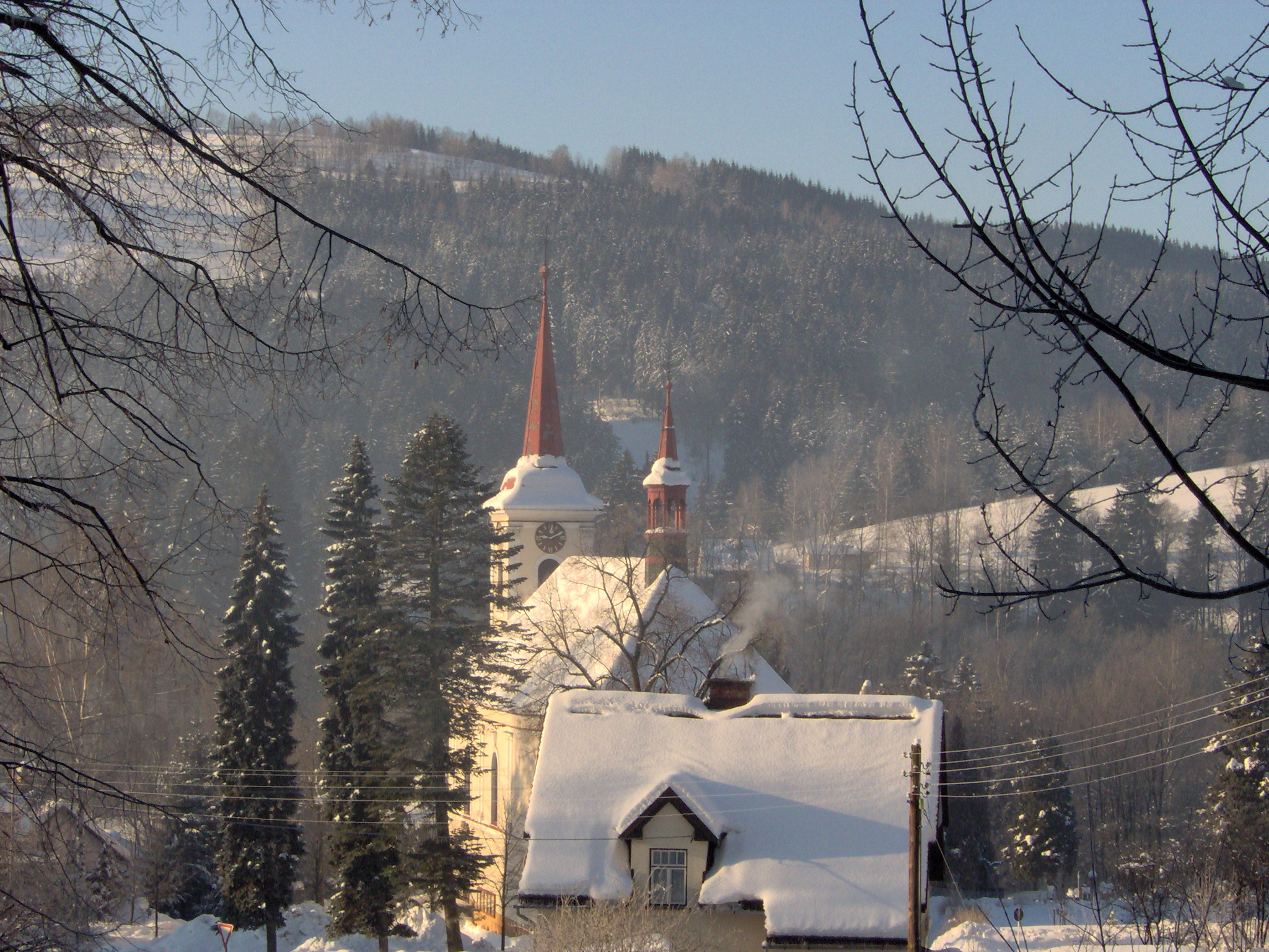 Kostel sv. Prokopa v Jablonci nad Jizerou